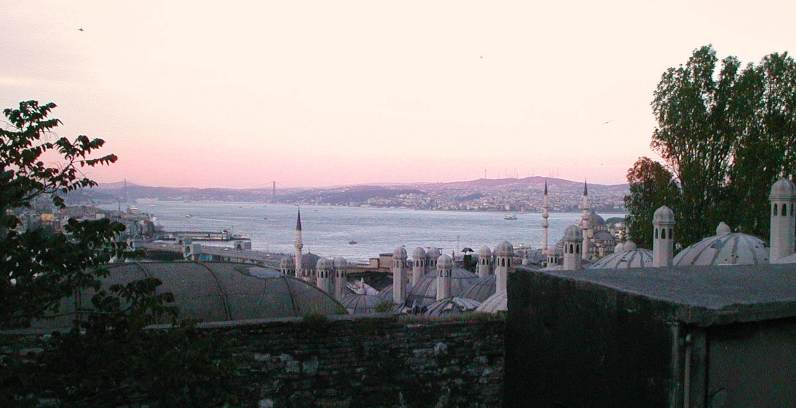 Západ slunce nad Bosporem Poridil Xmort, stav z roku 2002